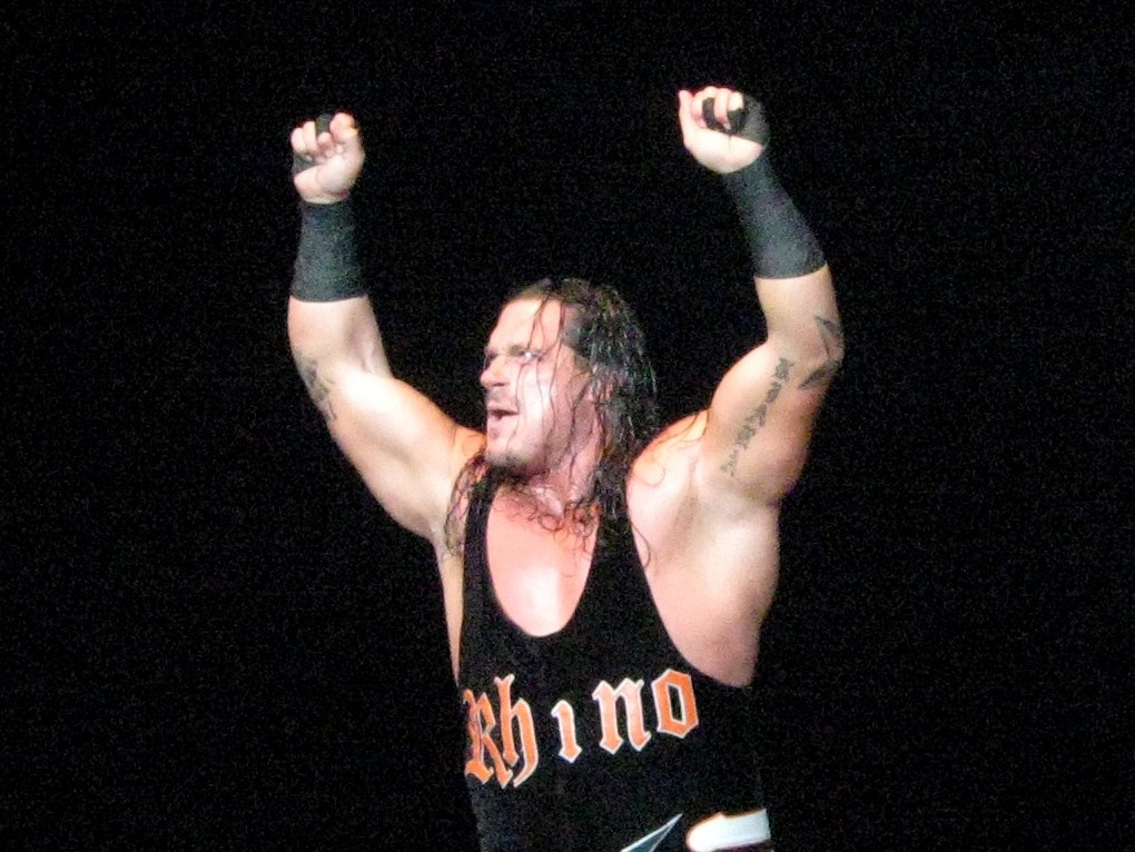 Rhino